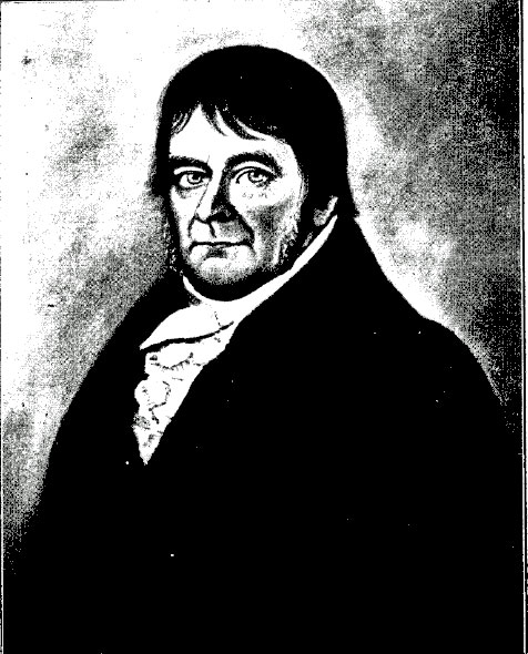 Stephanus Jacobus van Royen (1764-1834) maire, burgemeester en notaris van de voormalige Nederlandse gemeente Vledder, bewoner van Westerbeeck in Frederiksoord